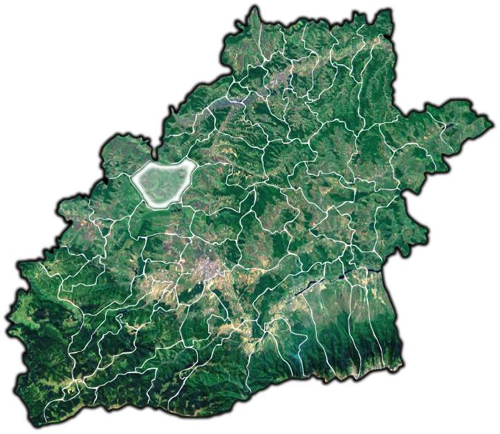 Loamnes jud Sibiu